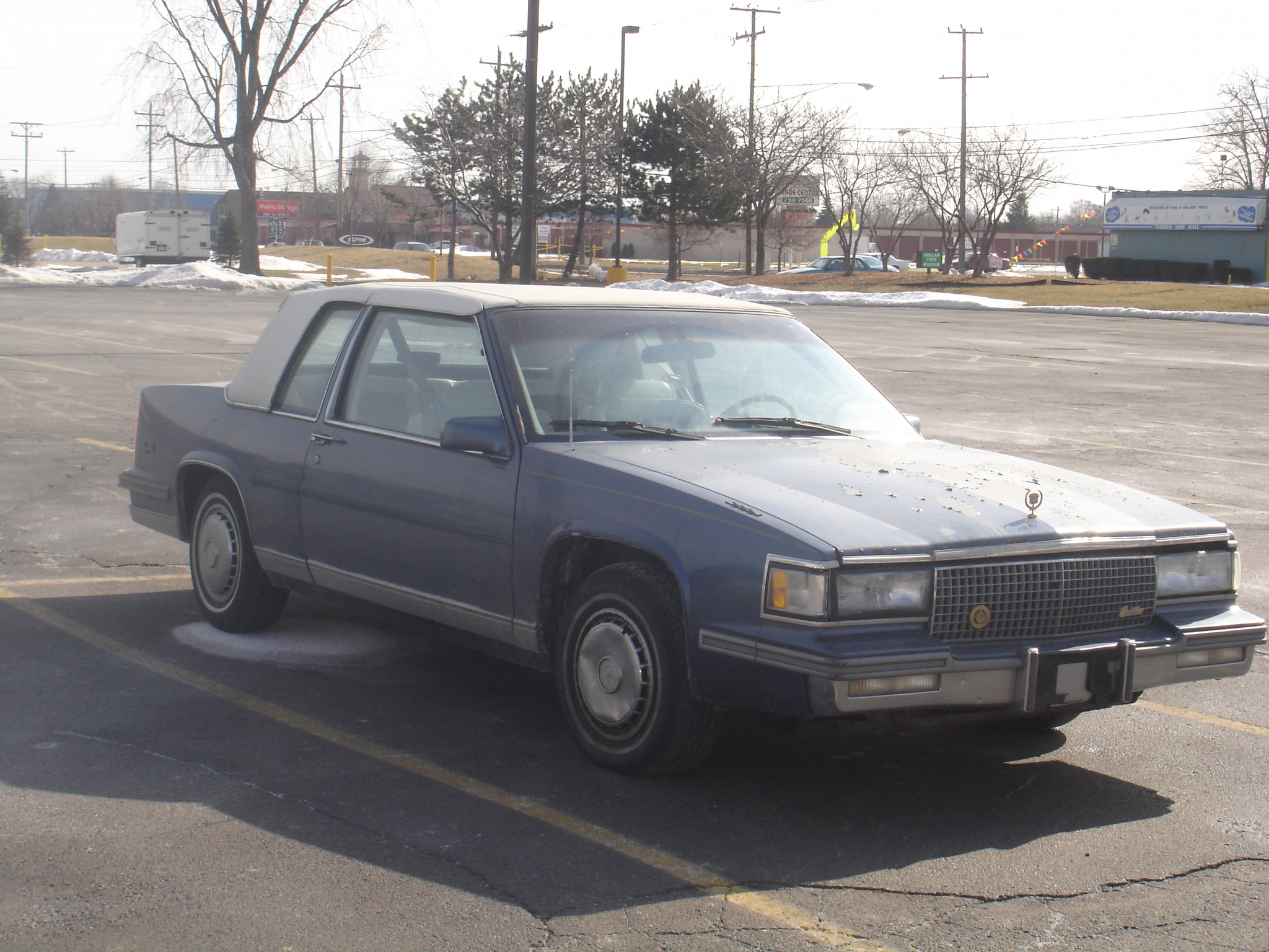 1989 Cadillac Coupe de Ville